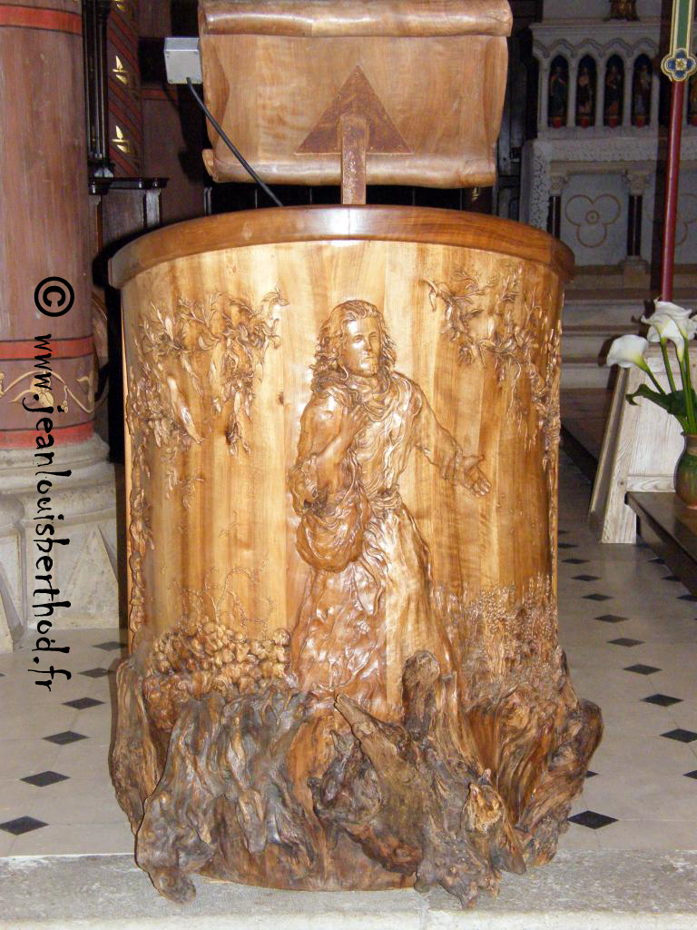 Ambon de l'Eglise d'Albens (Savoie, France) sculpté par Jean-Louis Berthod, sculpteur amateur de la dite-commune.